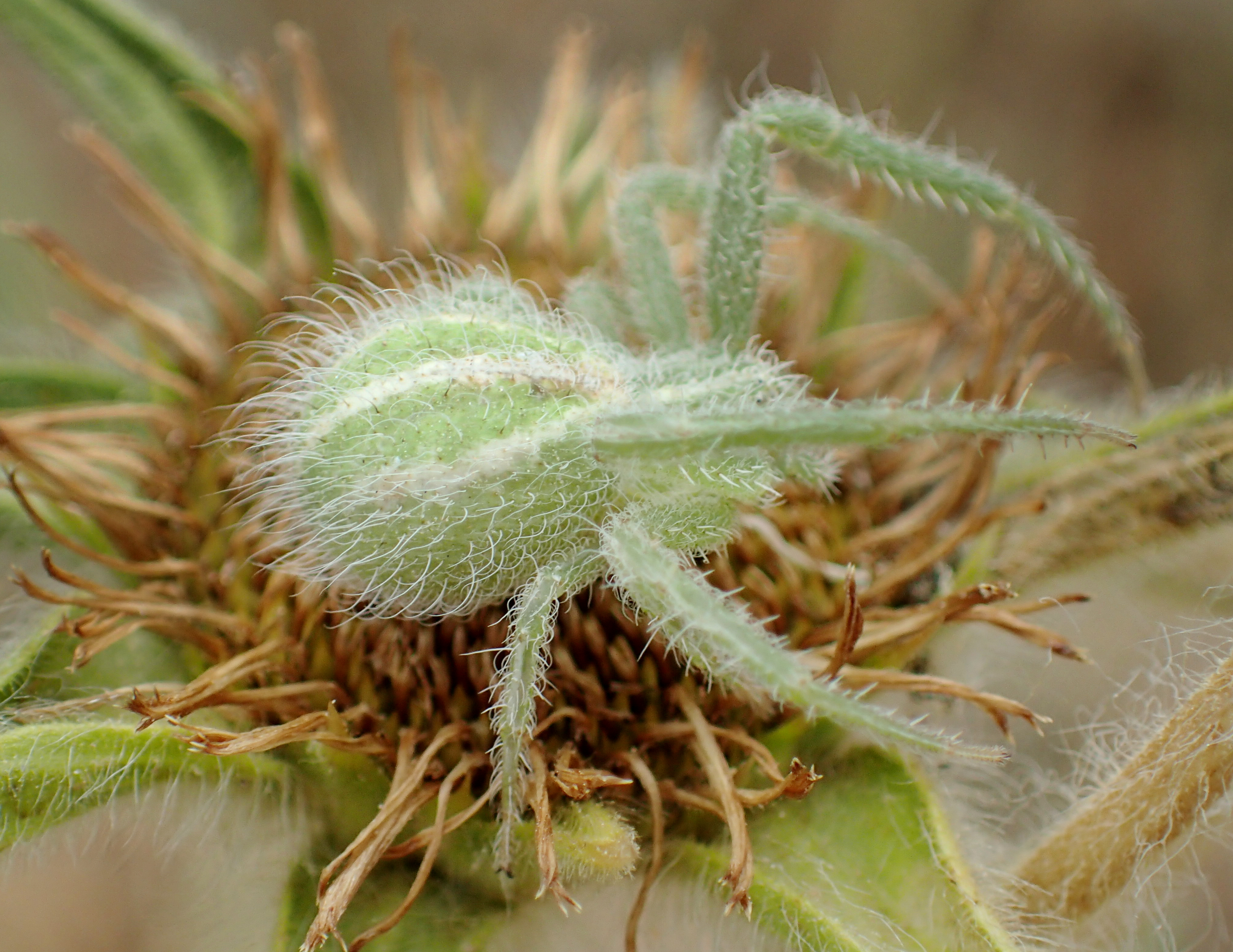 Heriaeus melloteei von Griechenland, Peloponnes, bei Sparta